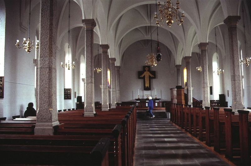 Brønderslev ny Kirke i Danmark. Skibet set mod øst